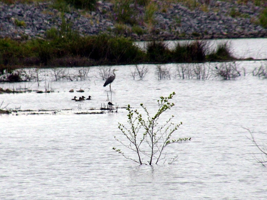 Des oiseaux